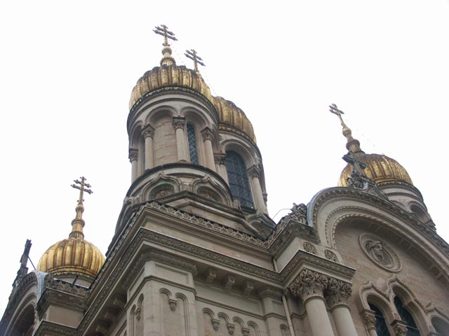 Russische Kirche Wiesbaden.